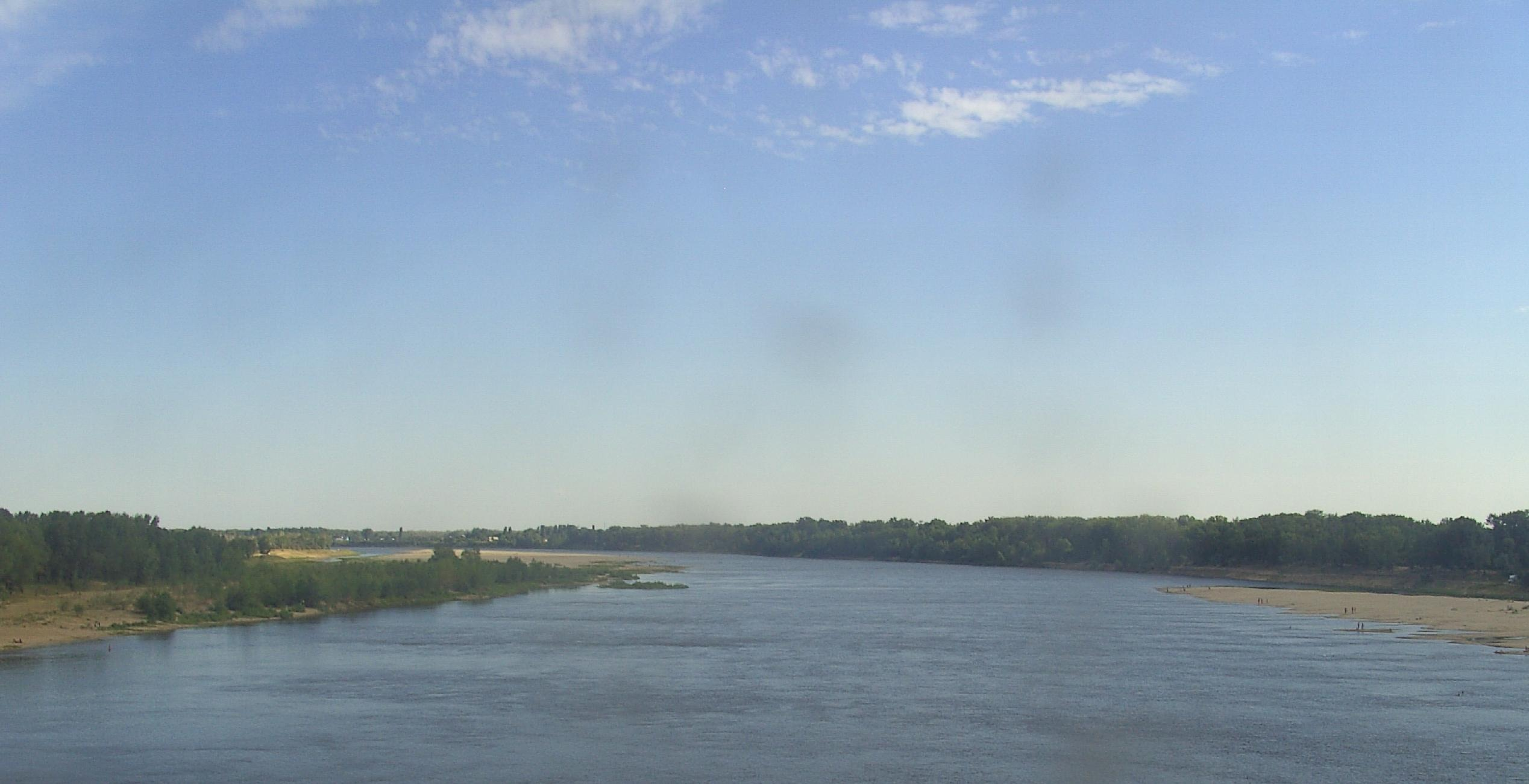 River Achtuba, Volgograd Oblast